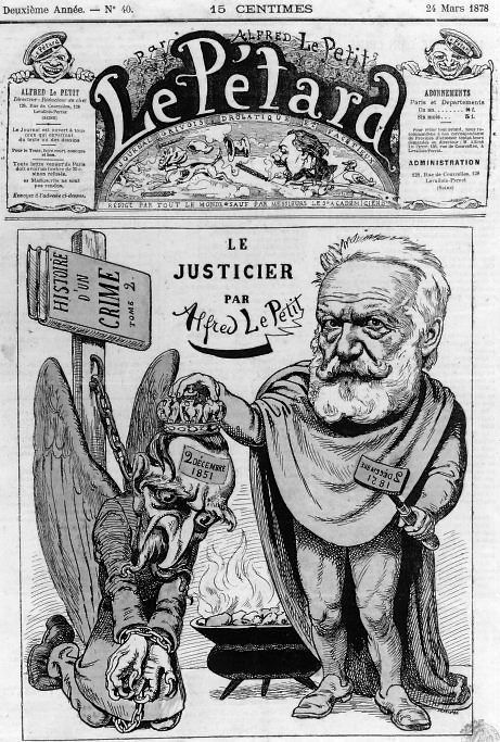 Caricature de Victor Hugo, Le Pétard (n°40) journal crée par Alfred Le Petit en 1877, dessin de Le Petit.